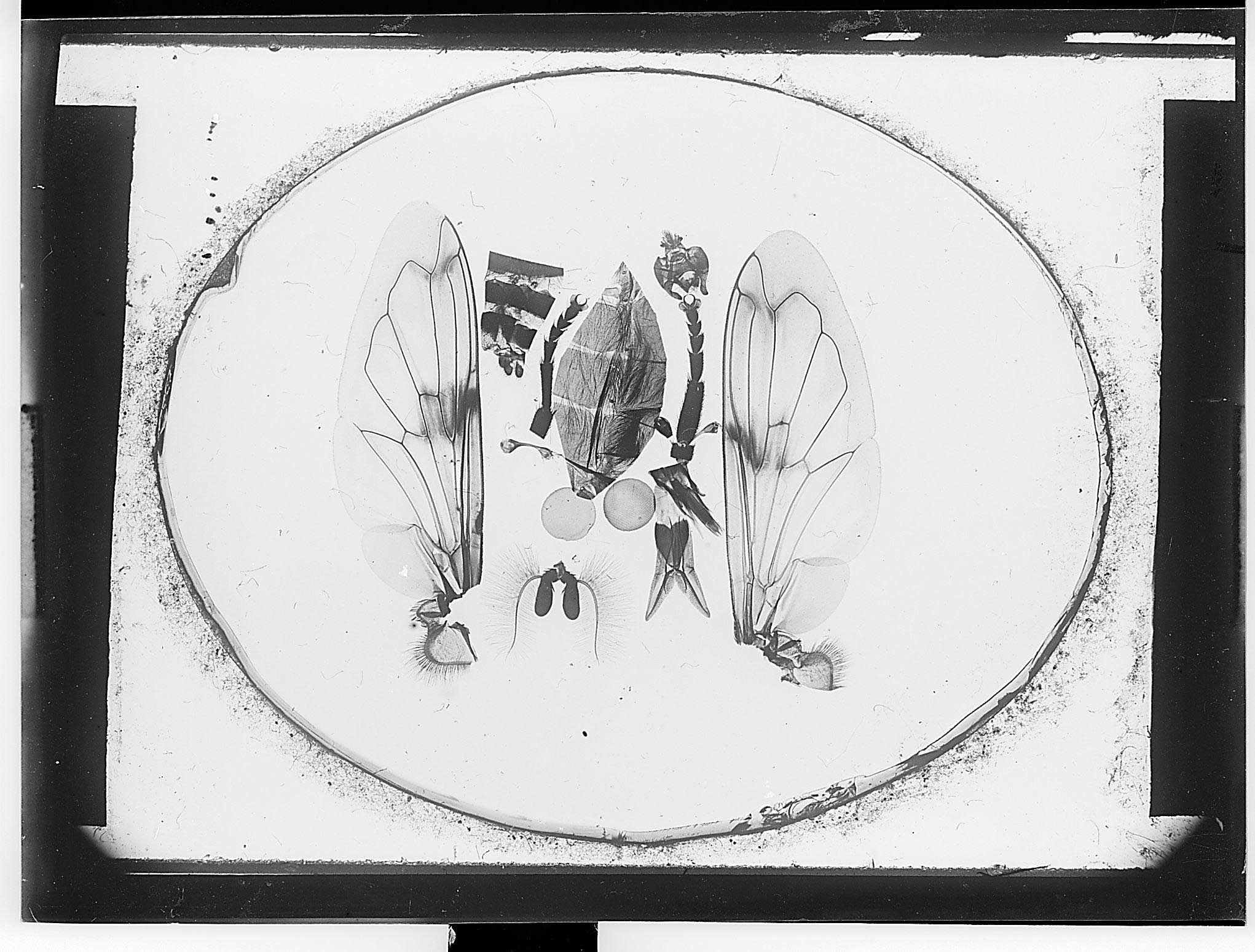 plaque négative au gélatino-bromure d'argent format 13x18cm. Sans inscription ni mention d'auteur.